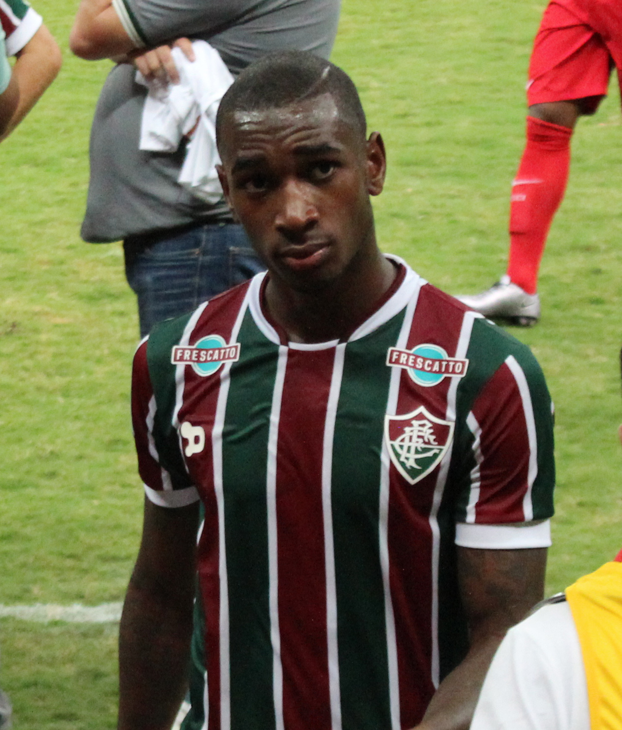 Gerson na partida Fluminense x Internacional, semifinal Primeira Liga, Estádio Nacional Mané Garrincha, Brasília (DF), Brasil.